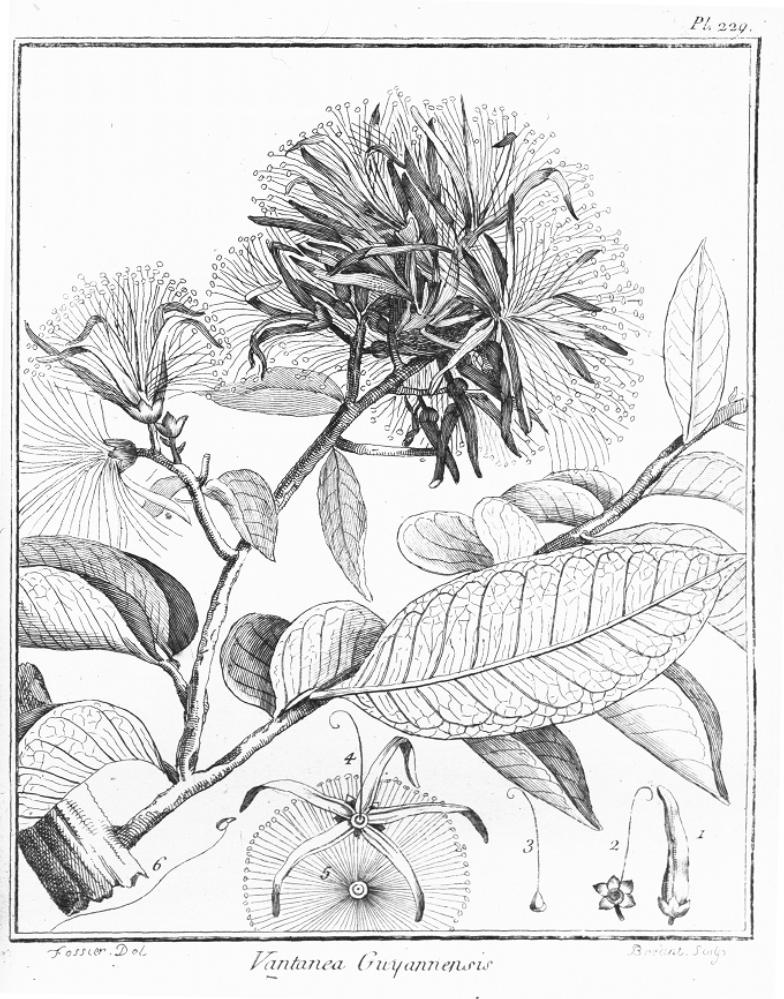 Illustration of Vantanea guianensis